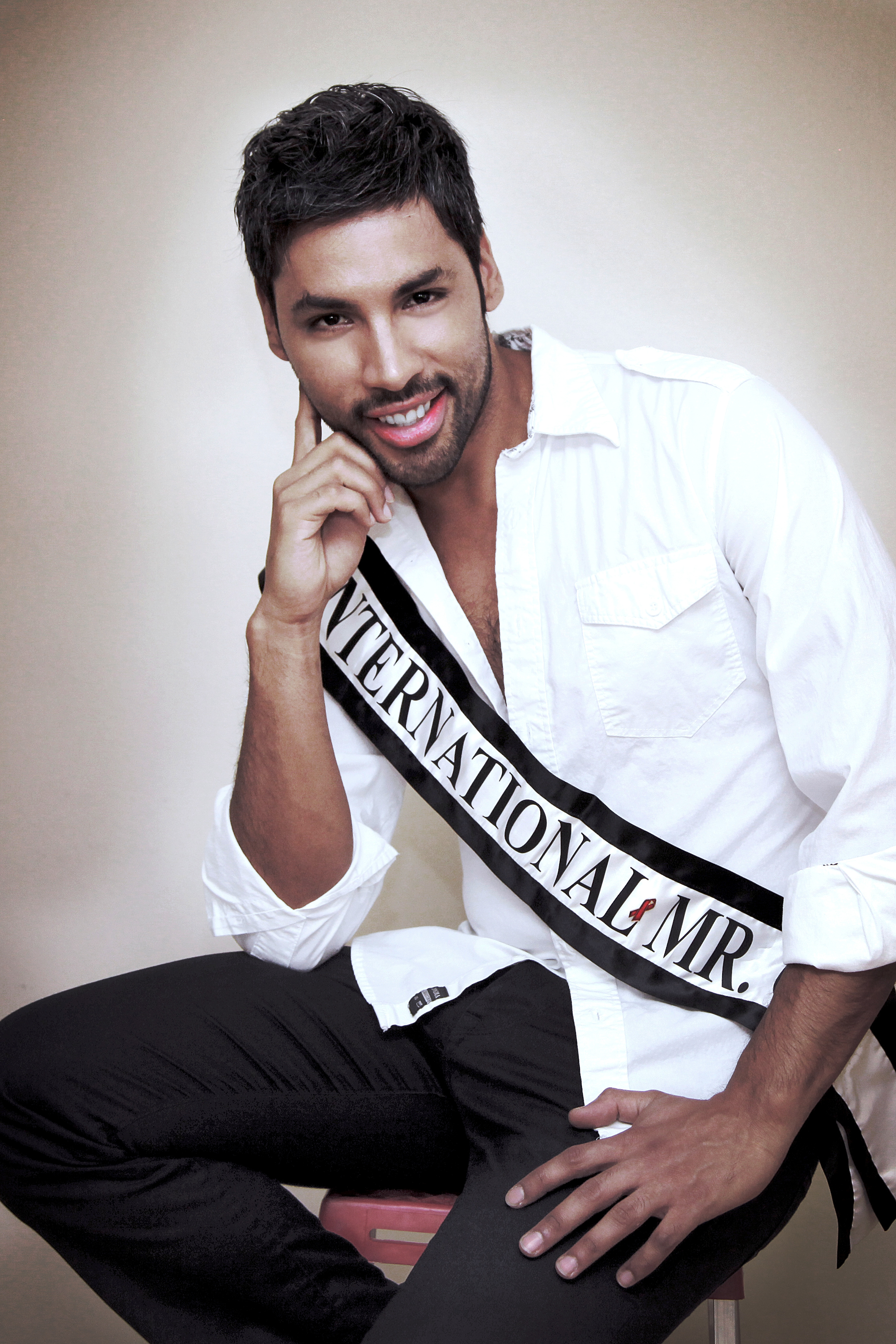 Pablo Salvador International Mr. Gay Titleholder.